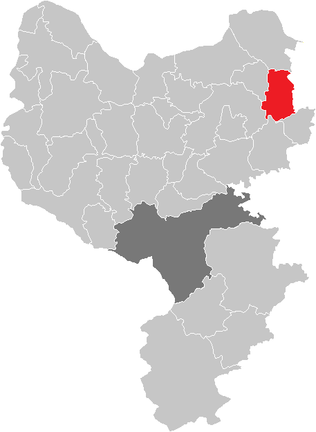 Bezirk Amstetten